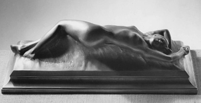 En gjutning i metallegeringen fritzi: Gusten Lindbergs "Vågen"